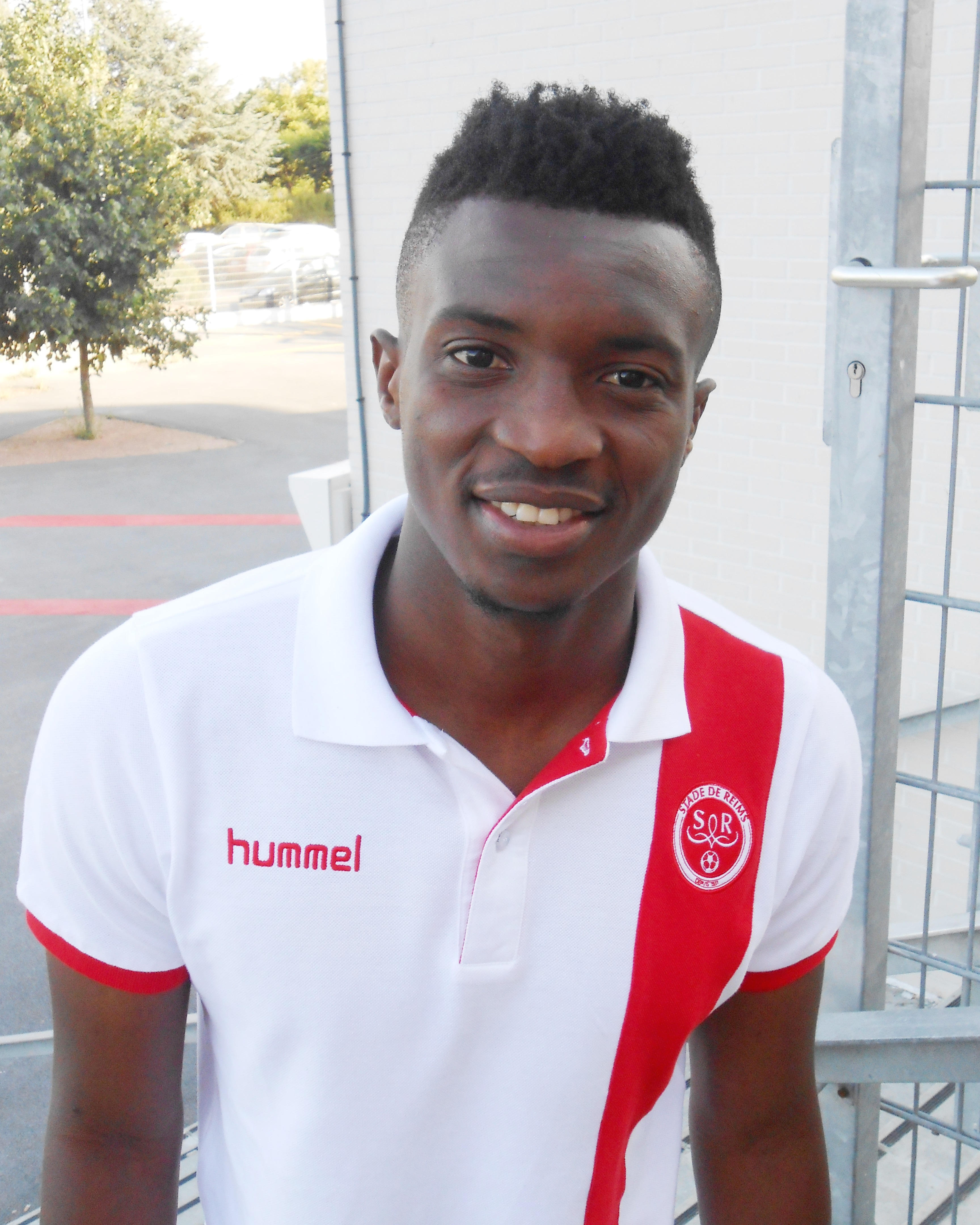 Benjamin Moukandjo lors de la journée des abonnés à Reims en 2015.